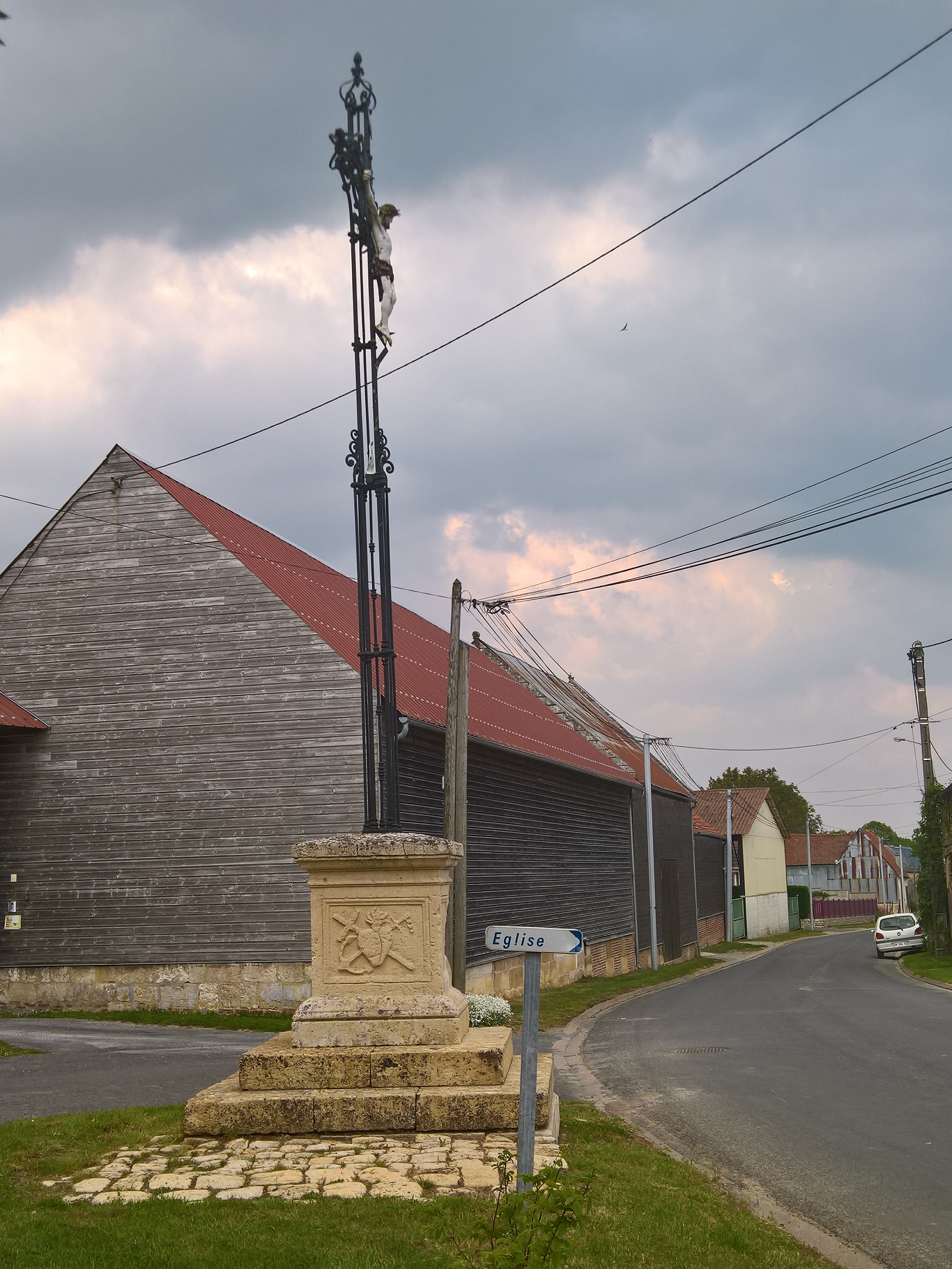 Fléchy : Le calvaire de la Rue principale, face à l'église, avec son socle sculpté